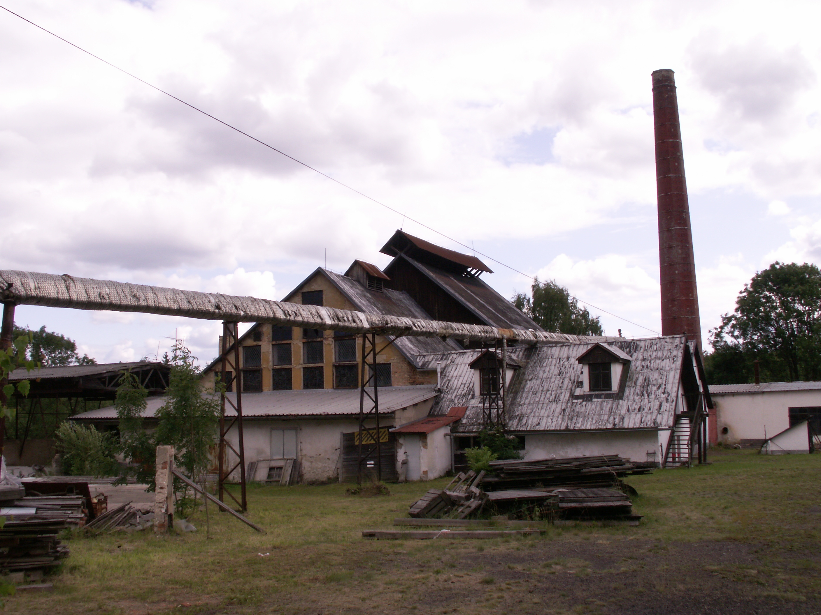 Bělá-Tasice, okres Havlíčkův Brod. Sklářská huť z konce 18. století, celkový pohled.